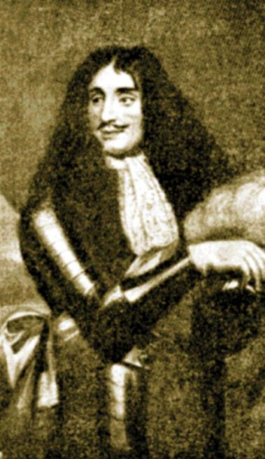 Face of Spanish General Baltasar Hurtado de Amezaga